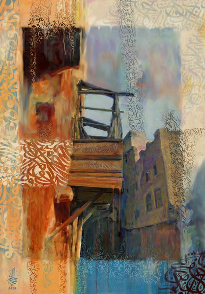 لوحة فنيّة للفنان القطيفي علي الجشي، دمج فيها عدّة صور من ضمنها منازل قلعة القطيف.